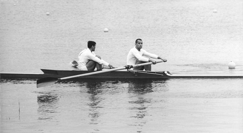 Dieter Grahn, Frank Forberger Zentralbild Wendorf-22.7.69 Brandenburg: 1. Verbandstreffen des Deutschen Rudersportverbandes der DDR am 20.7.69- Im Zweier o. Stm. wurden Frank Forberger und Dieter Grahn (links) vom SC Einheit Dresden Deutscher Meister der DDR